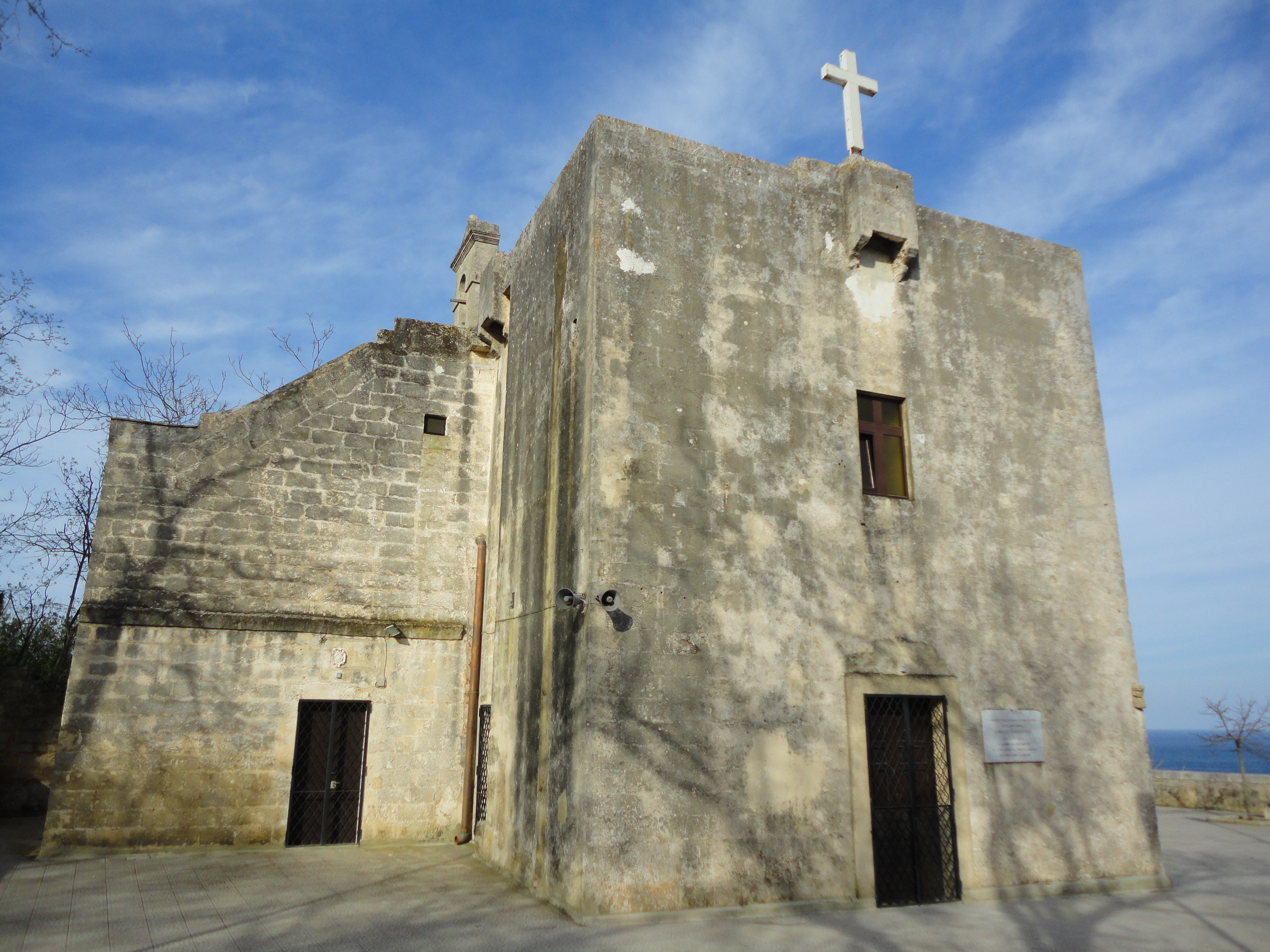 Chiesa di Marina Serra Tricase, Lecce